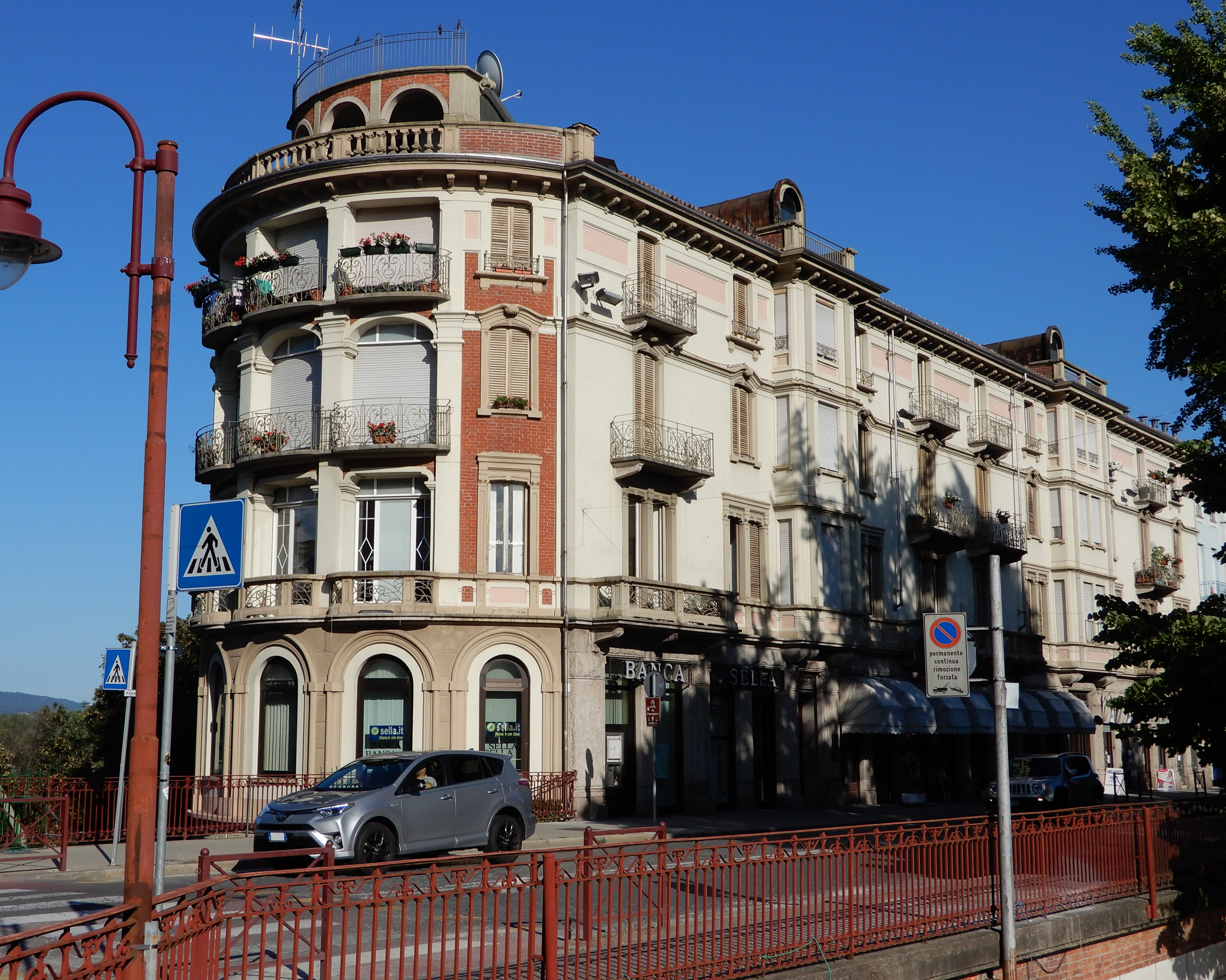 Veduta di Palazzo Ravera